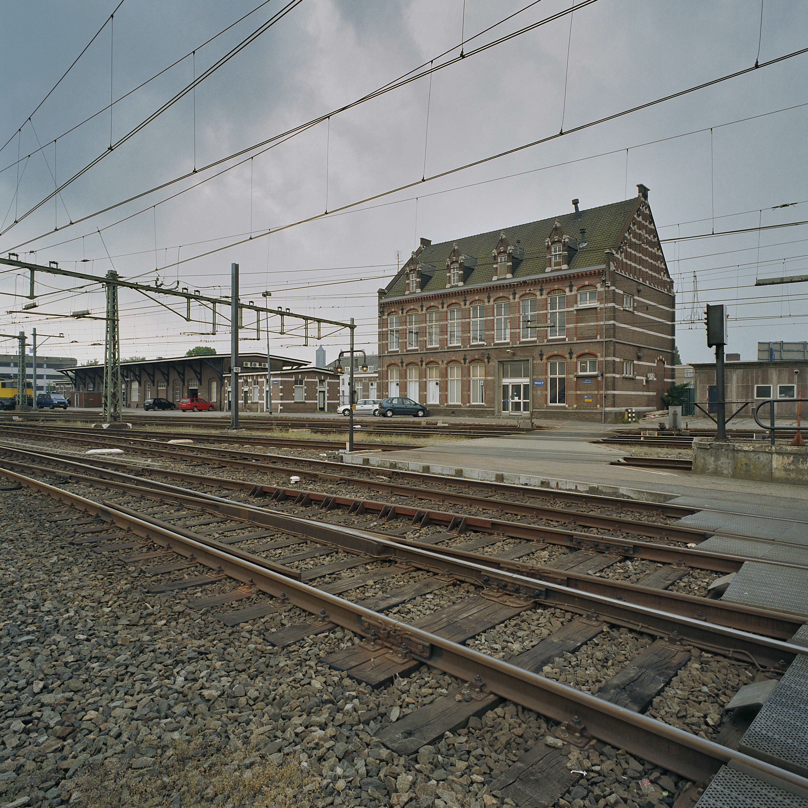 N.S. Station, stationspostkantoor: Overzicht noordgevel, spoorzijde (opmerking: gefotografeerd omdat het pand gesloopt gaat worden)